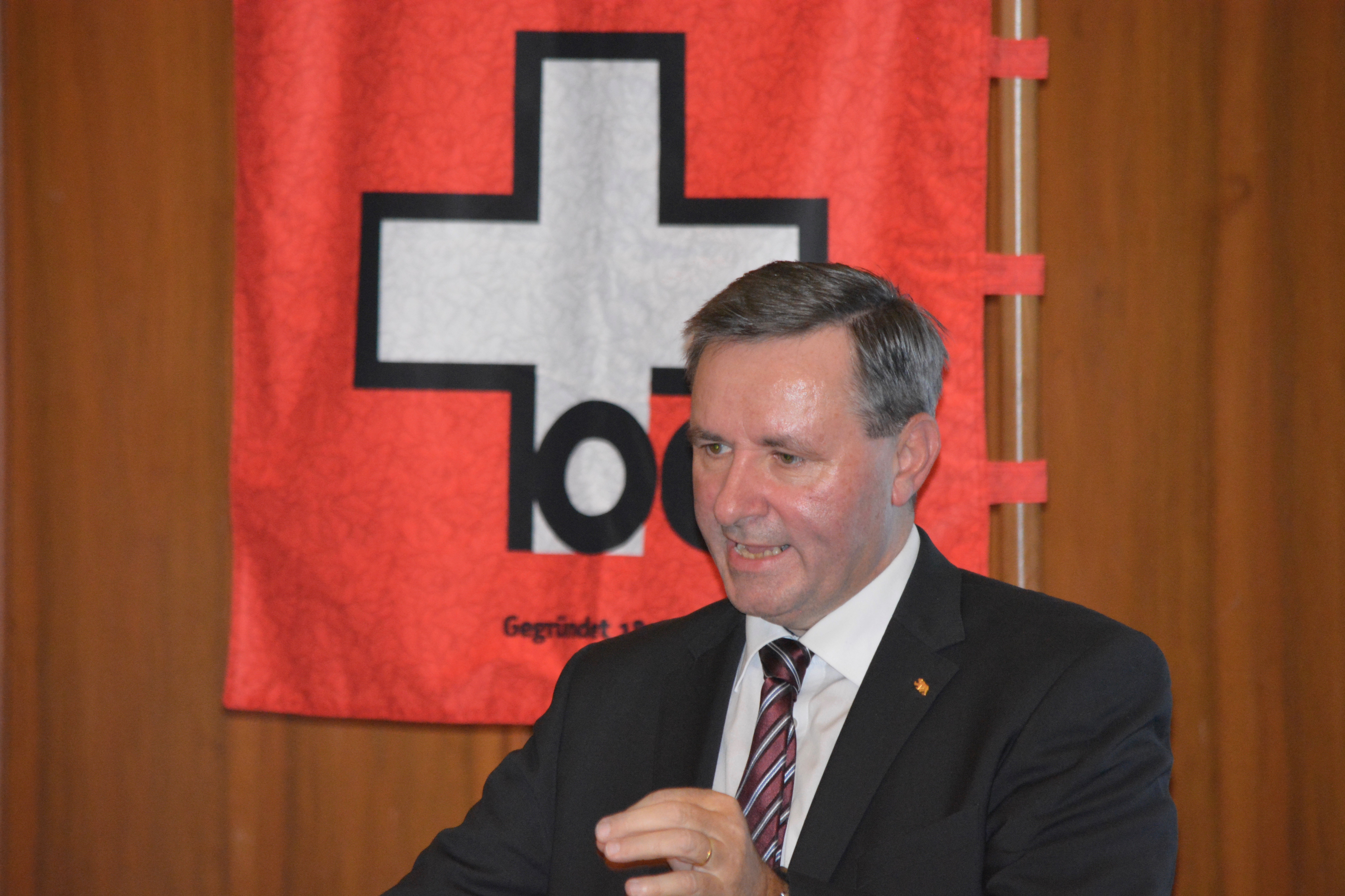 Nationalrat Werner Salzmann als Referent bei der Offiziersgesellschaft Langenthal und Umgebung im Traffelet Saal des Hotel Bären in Langenthal.